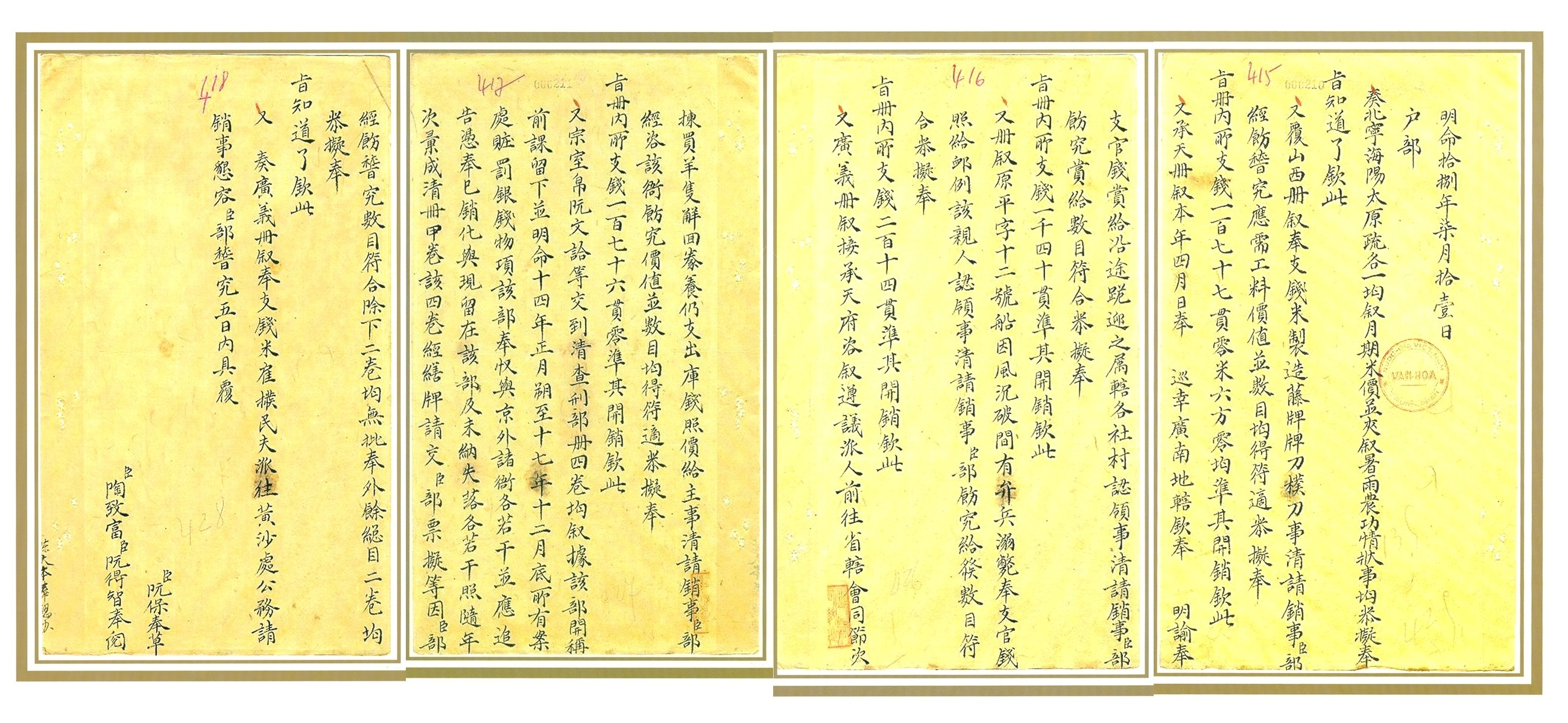 Châu bản triều Nguyễn (阮朝硃本) về thực thi chủ quyền ở Hoàng Sa (黄沙), ngày 11 tháng 7 năm Đinh Dậu niên hiệu Minh Mạng thứ 18 (1837).